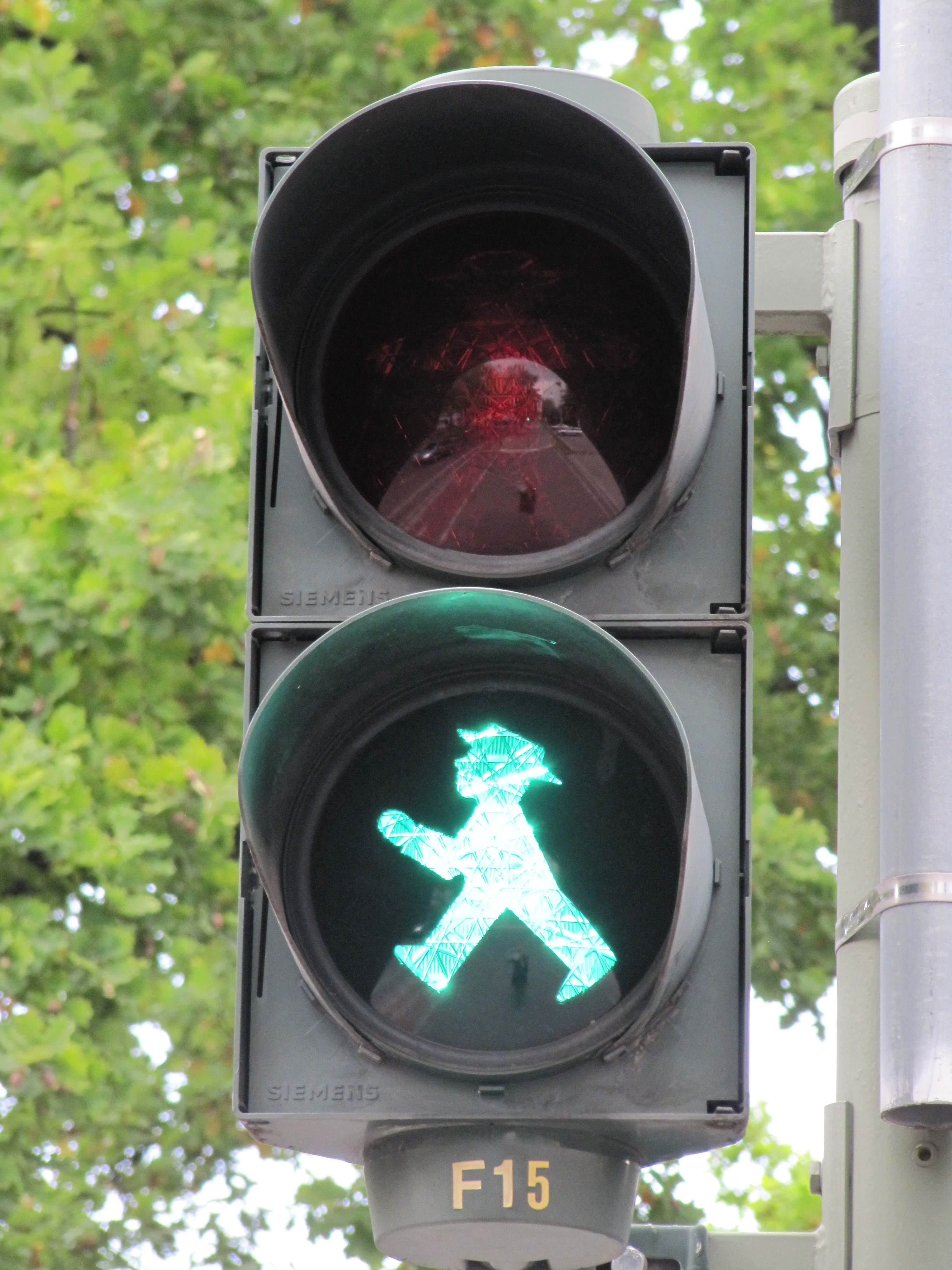 Feu vert, à Berlin